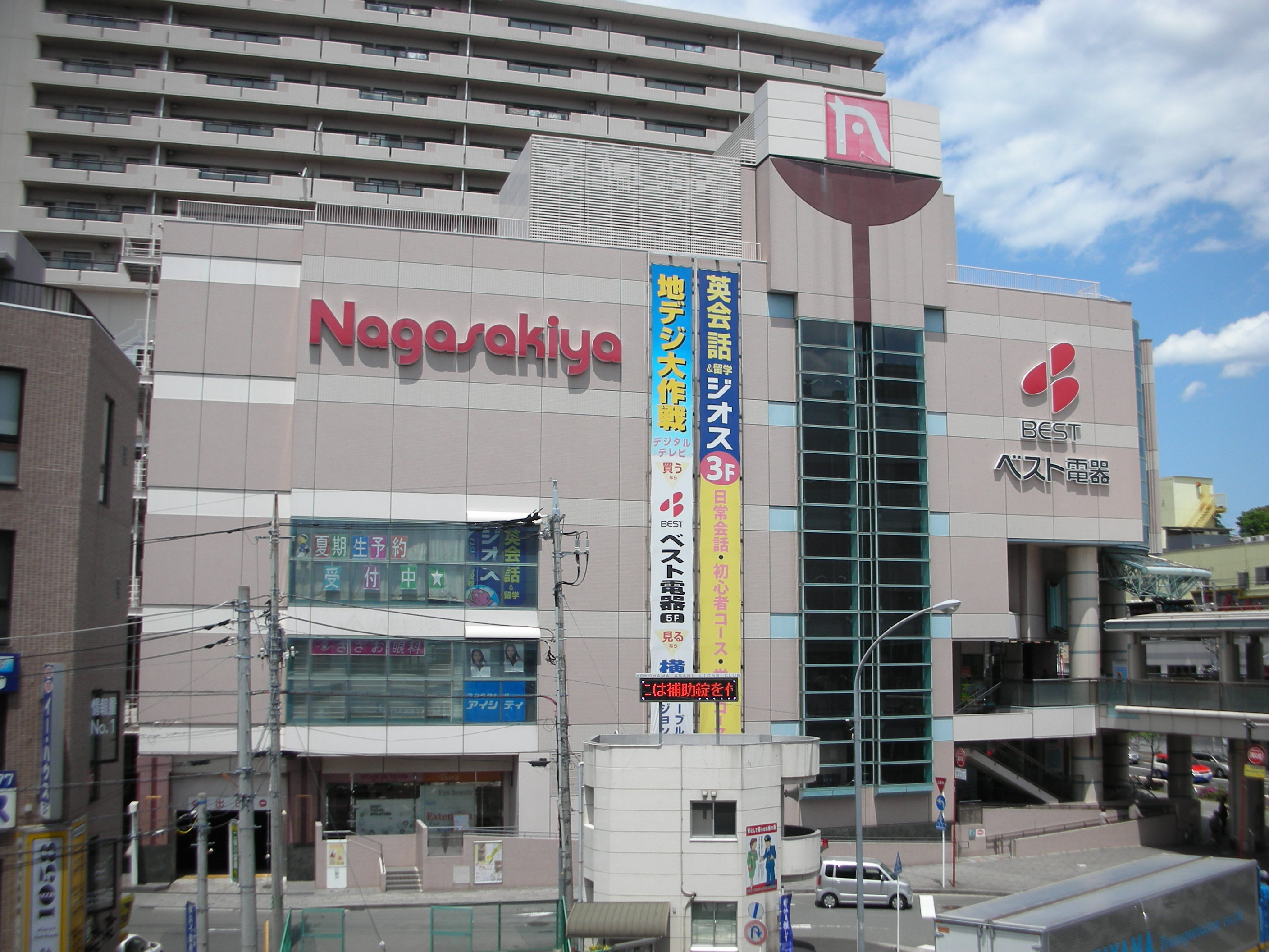 長崎屋二俣川店の外観